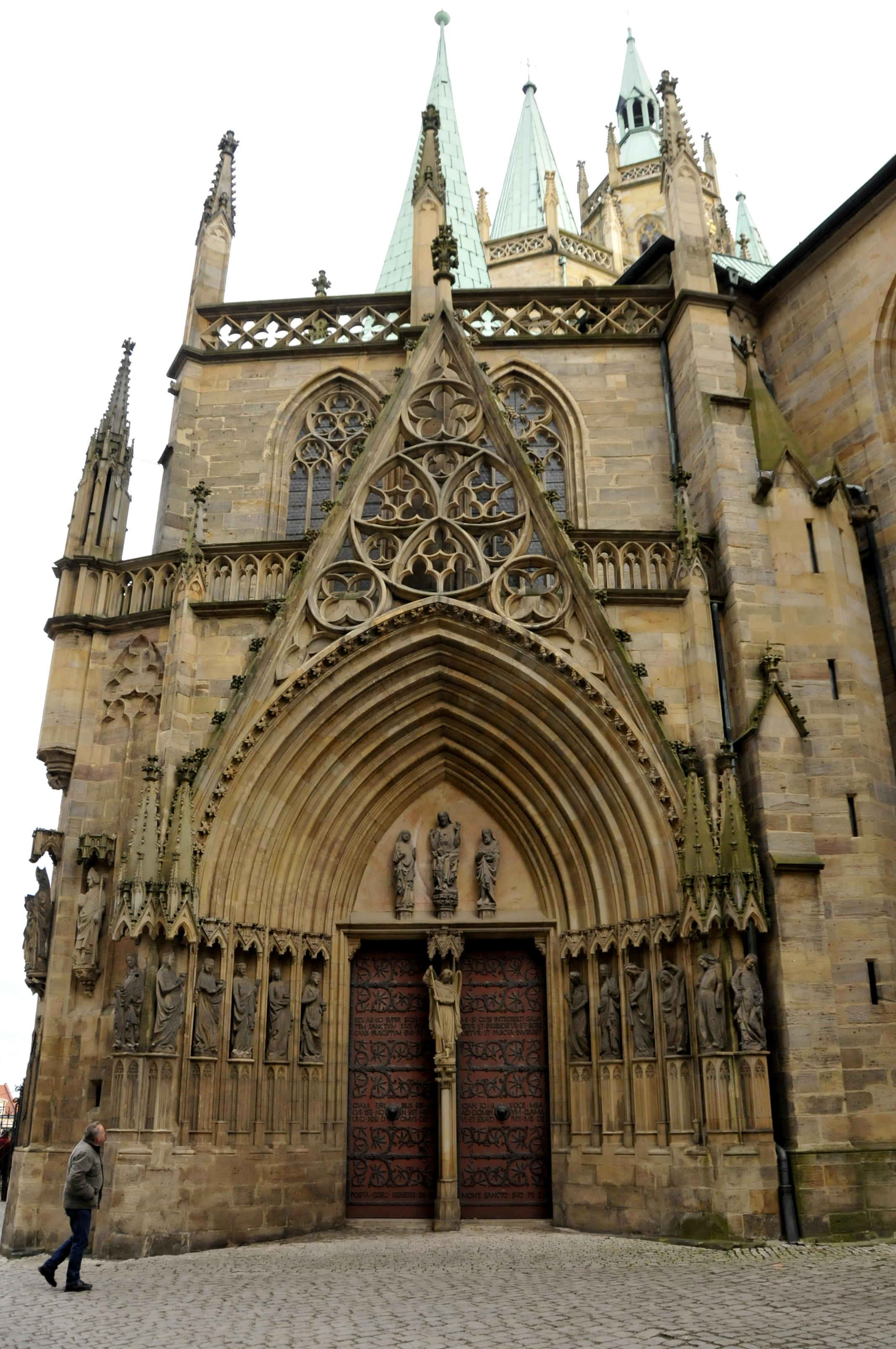 Nördlicher Seiteneingang des Erfurter Doms (verschlossen)